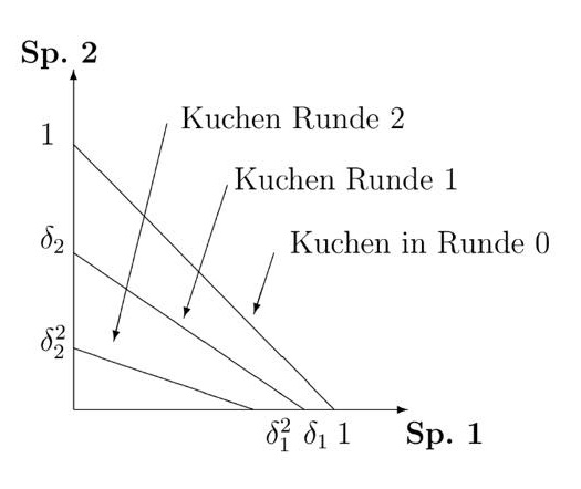 Einigungsdruck im Rubinsteinspiel